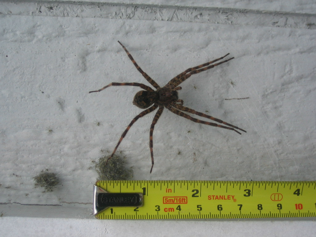 Wolf Spider (Virginia, USA)